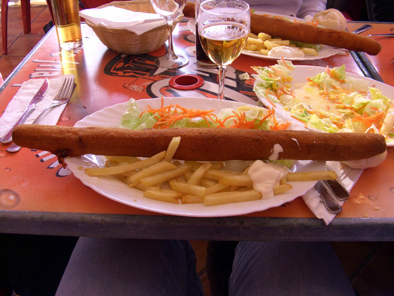 Flamenquín Cordobés en un restaurante de Rute.